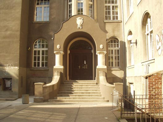 Foto vom Südportal der Rosa-Luxemburg-Oberschule Berlin-Pankow